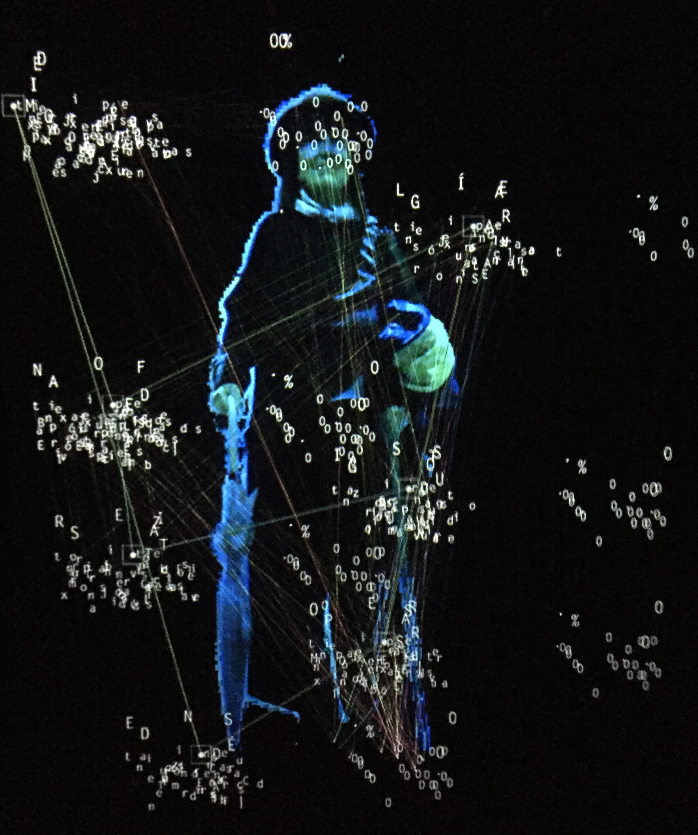 en la instalacion data ergo sum de Ana Marcos.